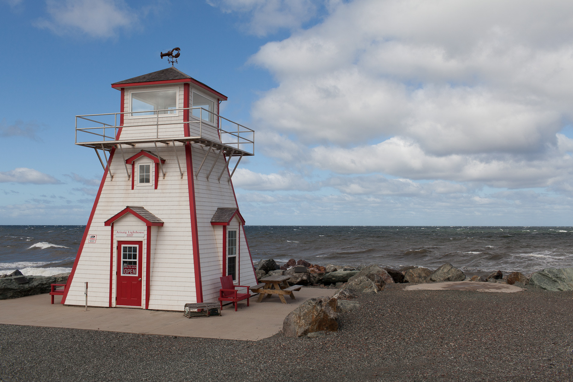 500px provided description: Canada 2012 Travel